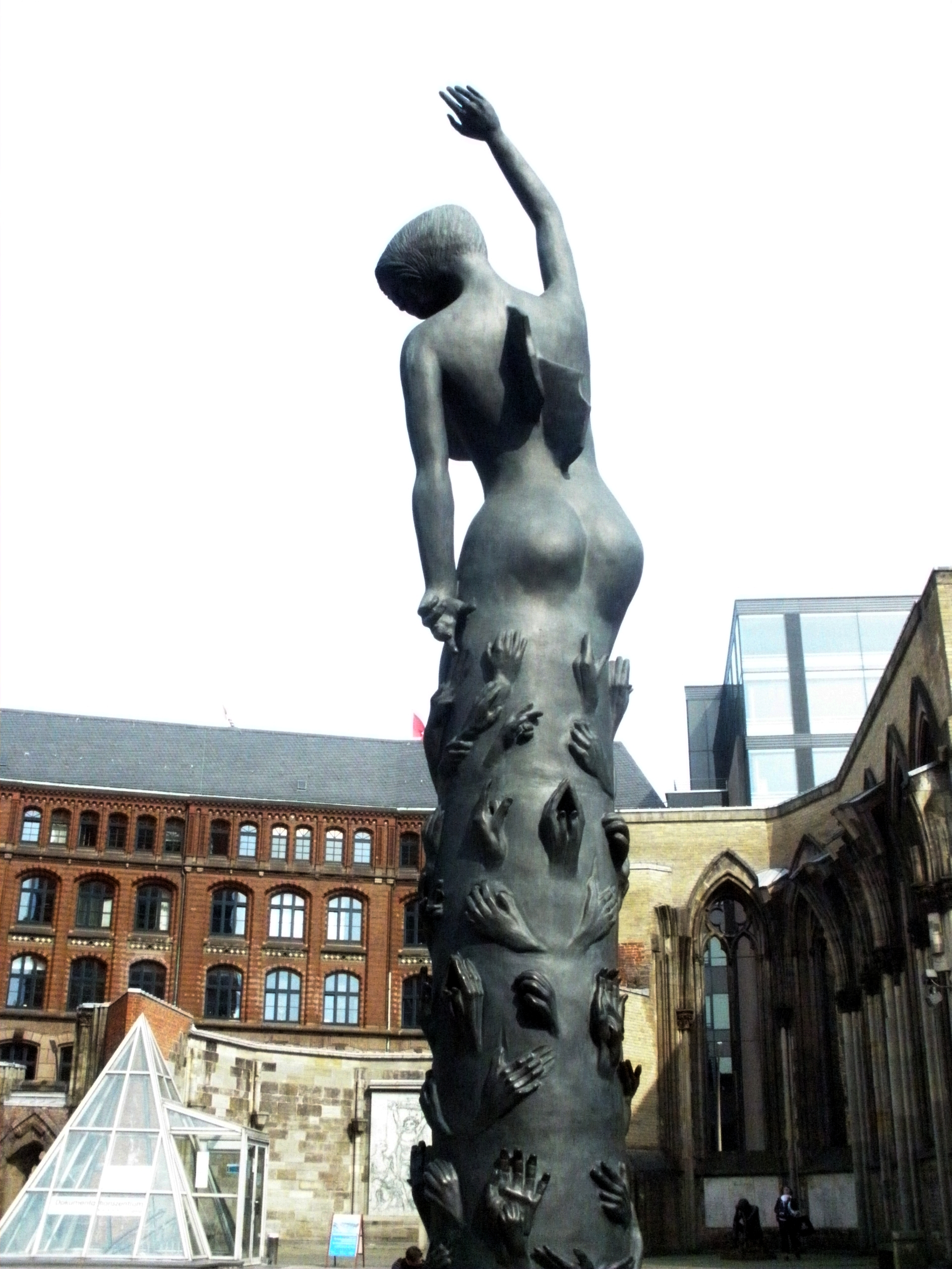 mahnmal st. nikolai bronze erdenengel von edith breckwoldt